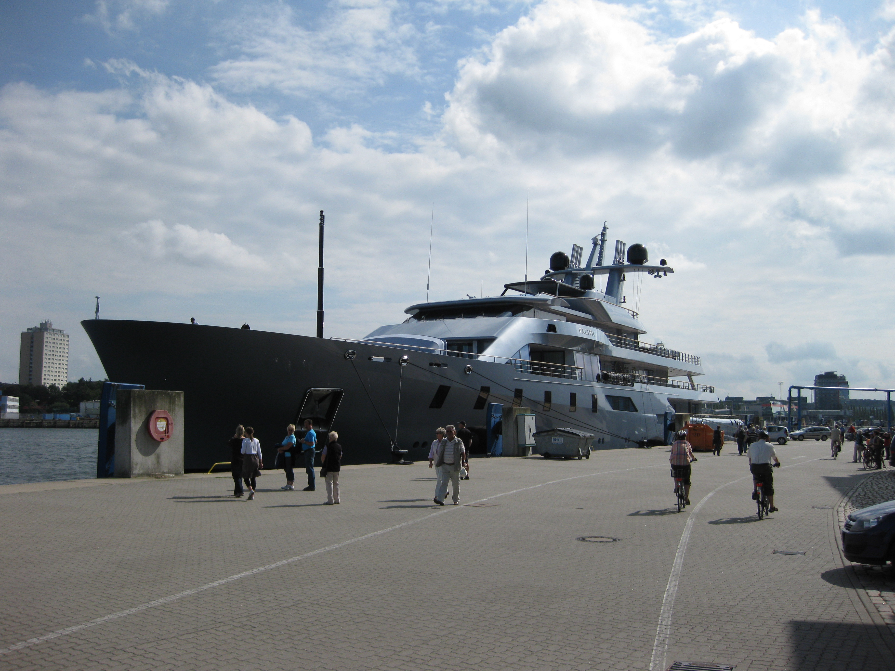 Yacht "Pacific" in Kiel